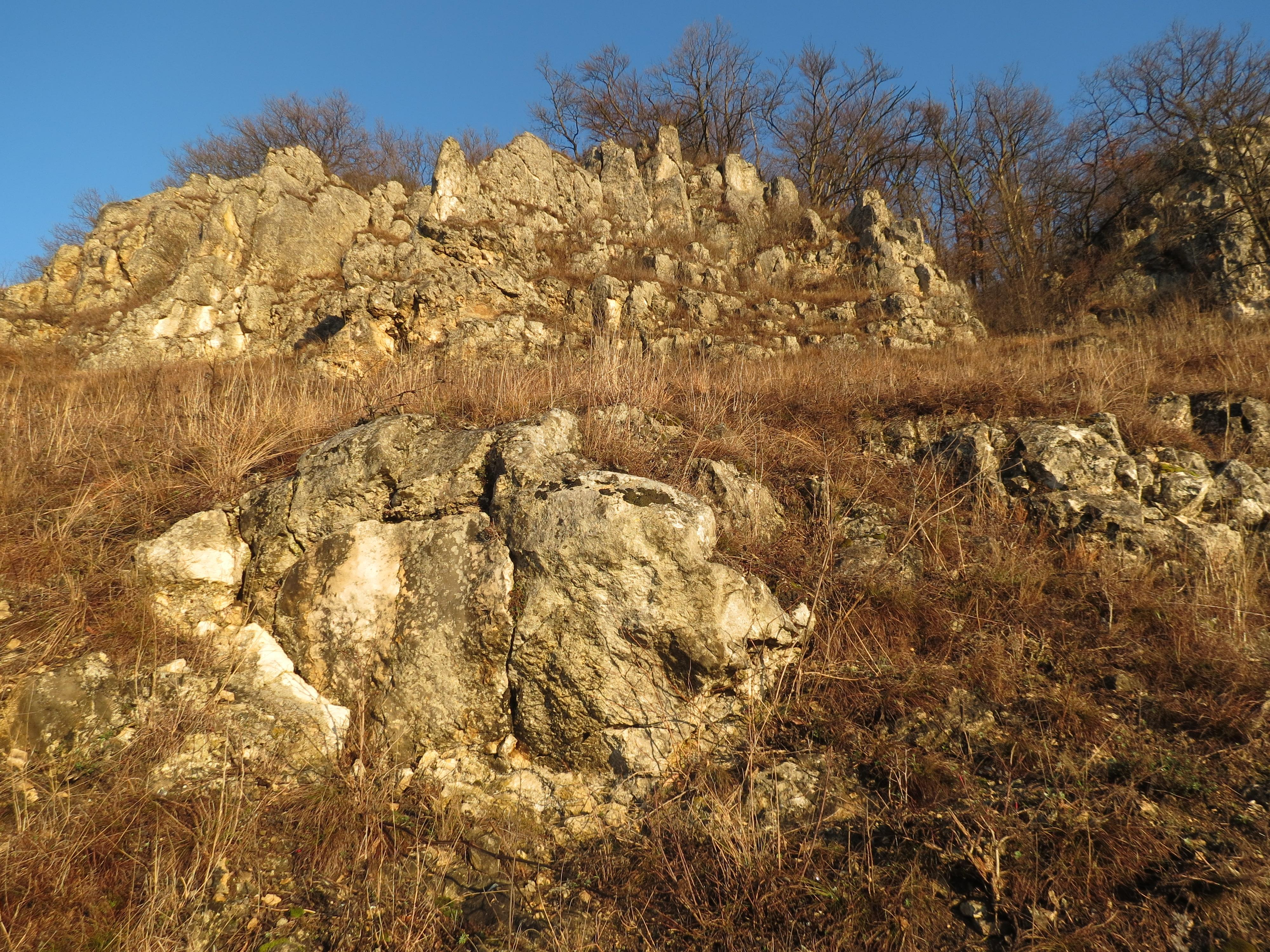 Felsen am Südhang des Keilberges bei Regensburg.